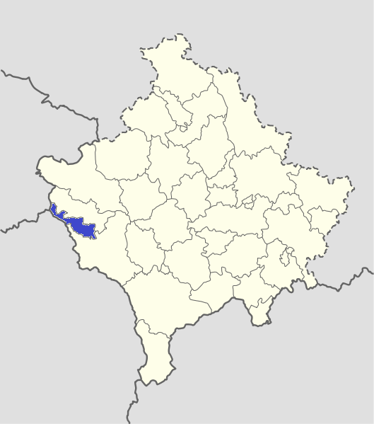 Vendndodhja e Junikut.